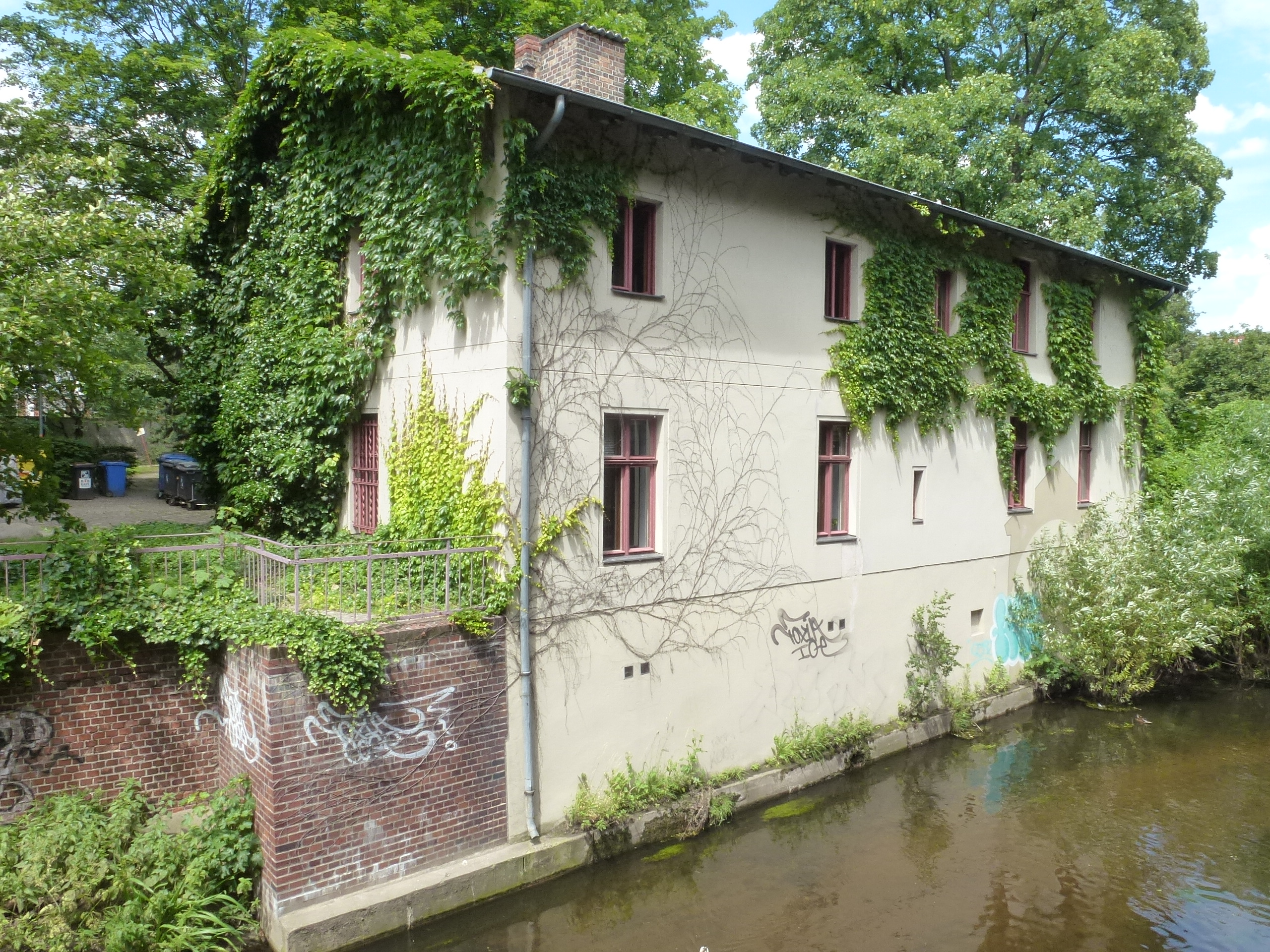 Berlin-Gesundbrunnen Pankemühle